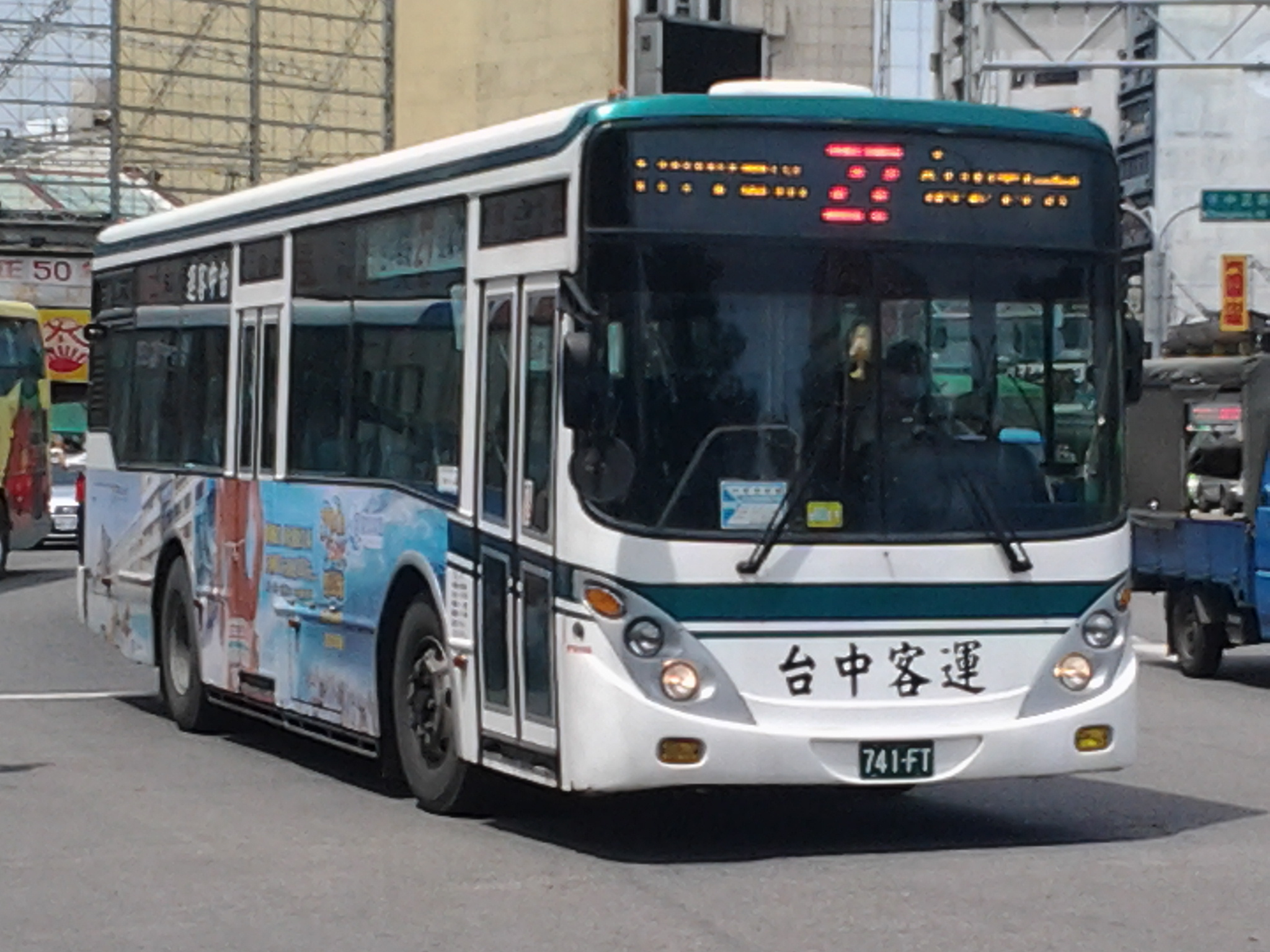 2004〈2004〉 HINO ERK2JML（日盈）